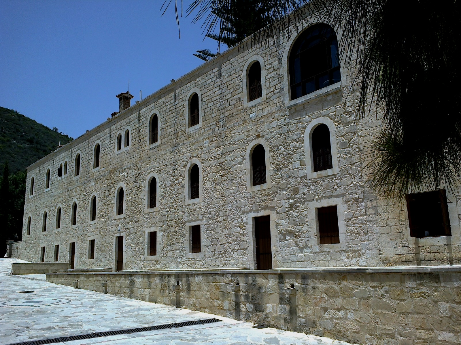 Chypre Agios Neofytos Monastere